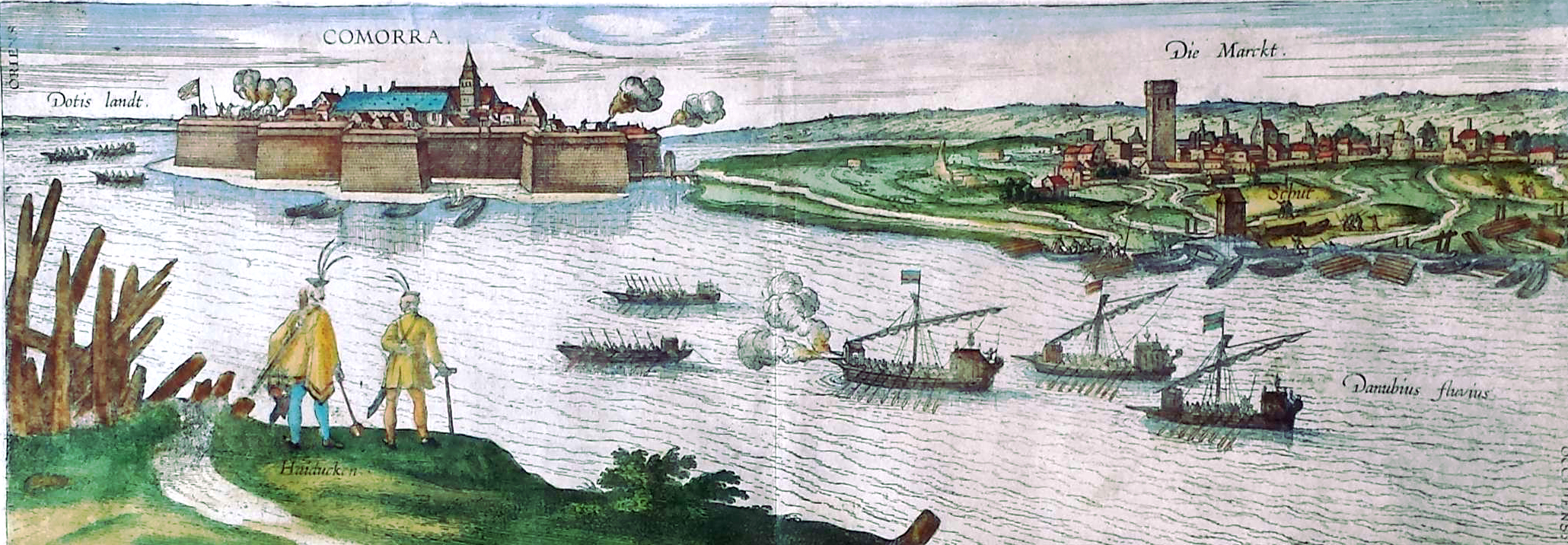 Pogled na Komarno sa šajkama, umetnička gravira